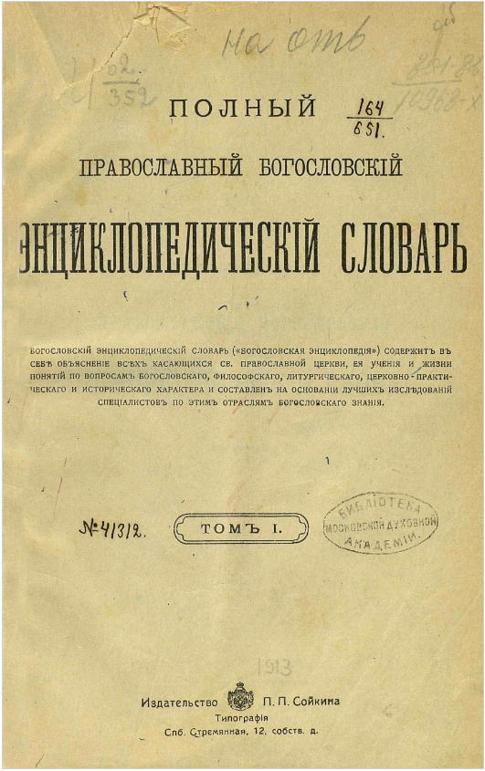 Полный православный богословский энциклопедический словарь.Титульный лист Первого тома.